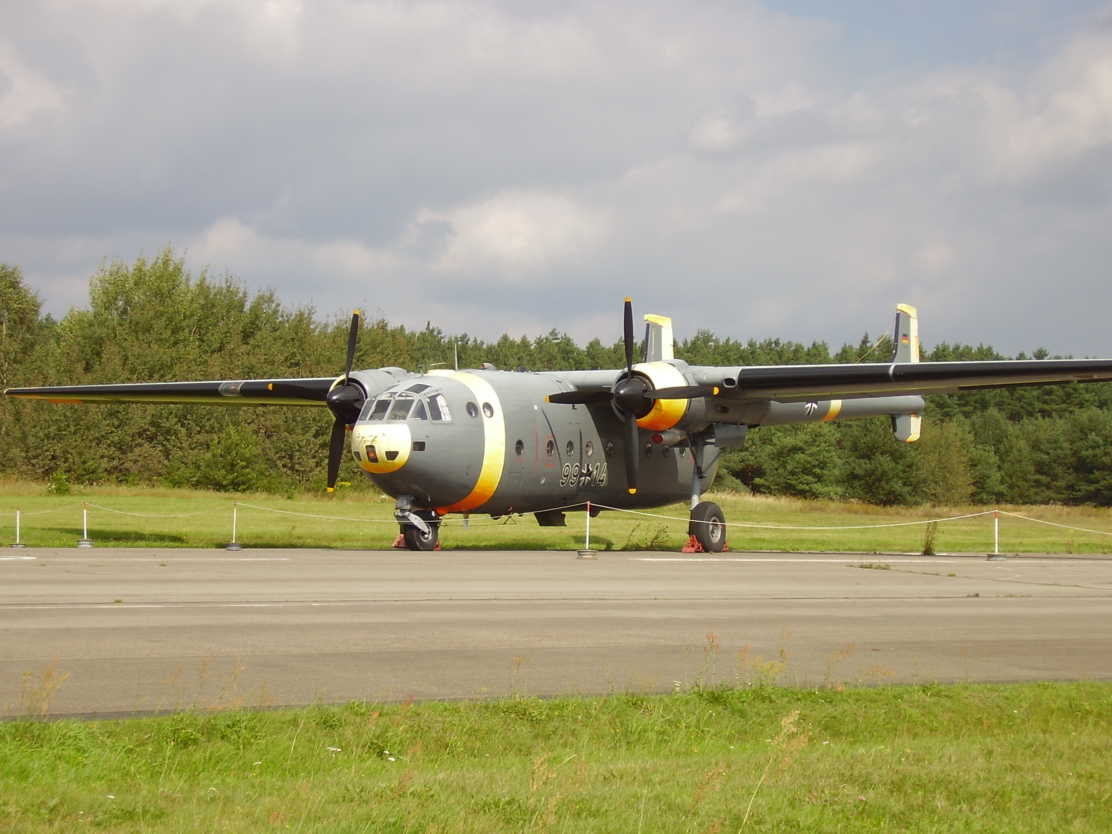 Nord 2501 Noratlas at the Luftwaffenmuseum der Bundeswehr; Airforce Museum of the Bundeswehr; Berlin-Gatow, Nord Noratlas